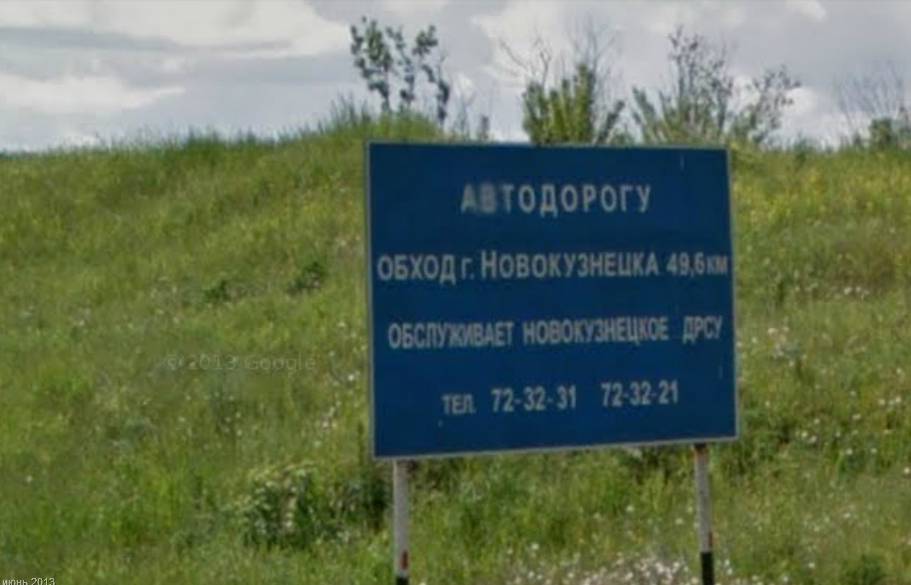 Табличка обход города Новокузнецка на трассе НКАД